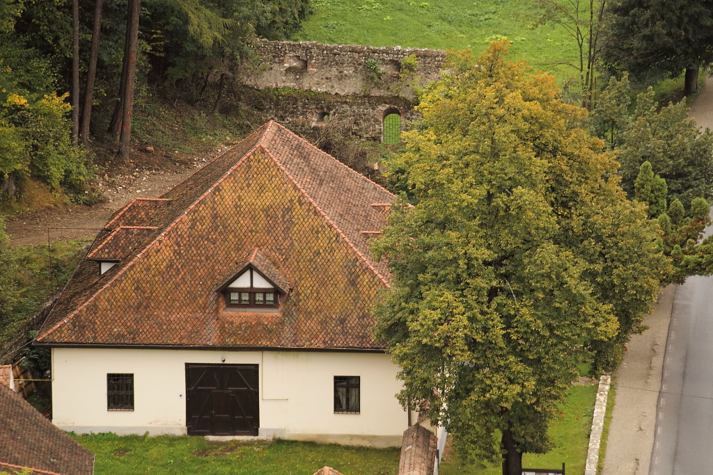 Ansamblul vămii Branului